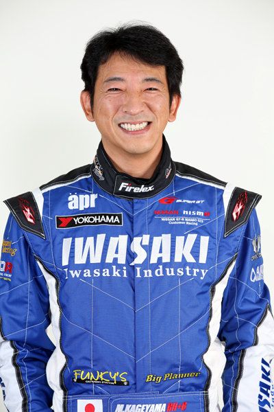 レーシングドライバー影山正美 2014SUPER GT #30IWASAKI apr GT-R